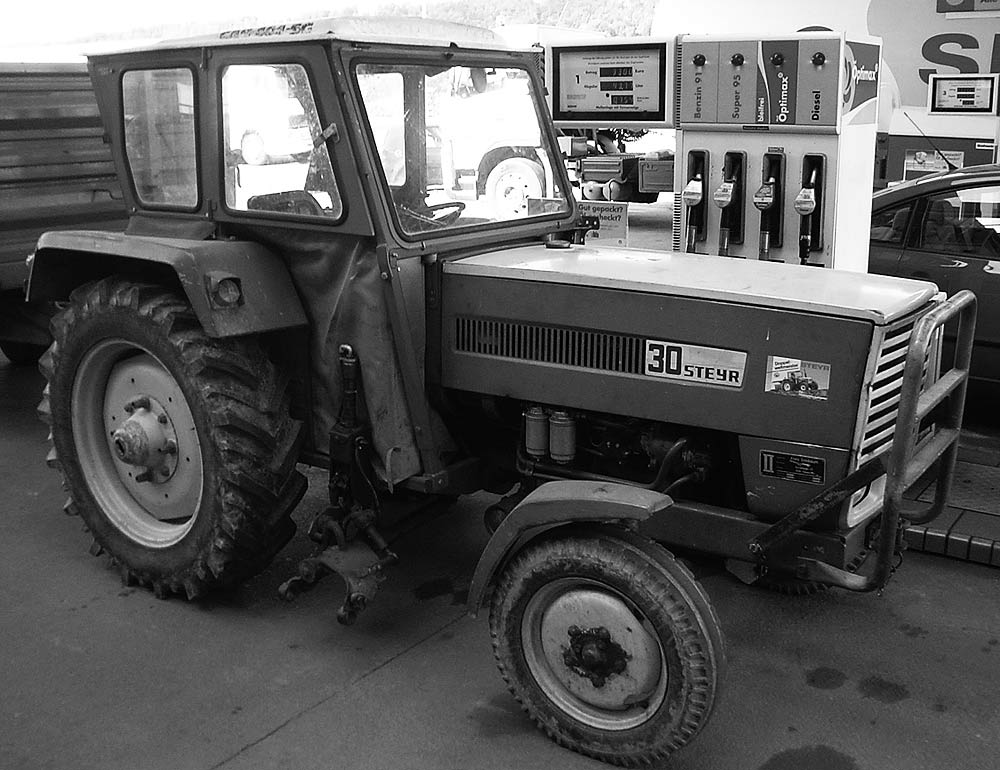 Der Steyr 30 als 1960er-Jahre-Auftakt der „Plus-Serie“, Design von Lepoix.